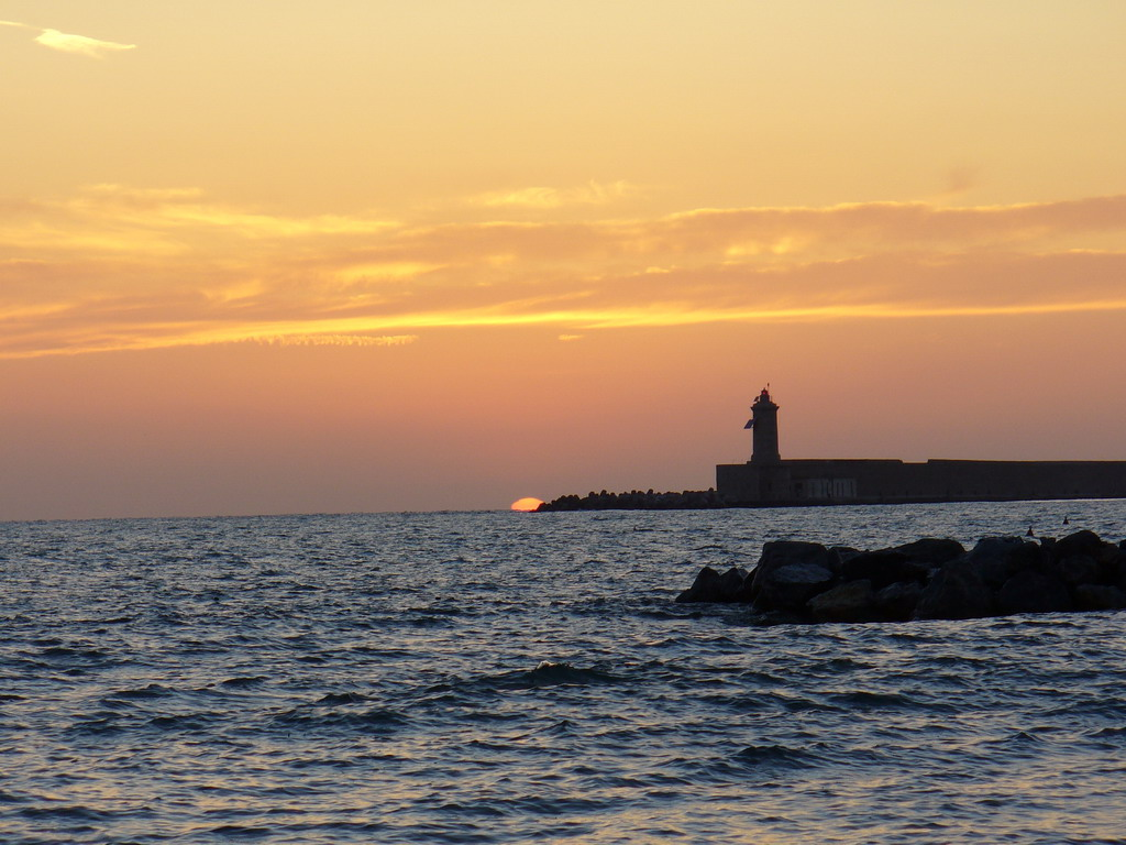 Livorno - Bagni Tirreno - Sun setting & lighthouse.